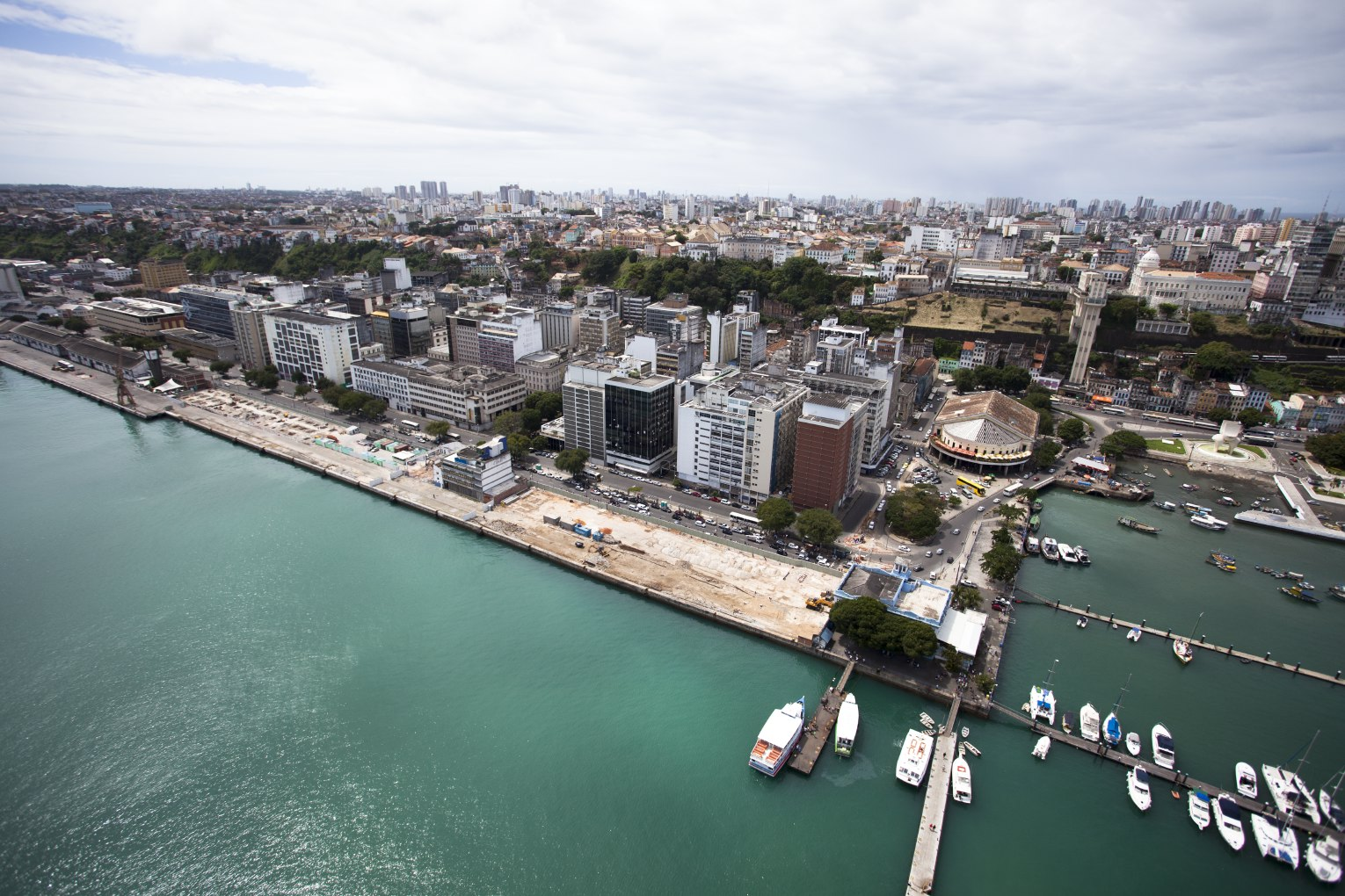 Vistaaérea do Porto de Salvador e bairro do Comércio, em Salvador.